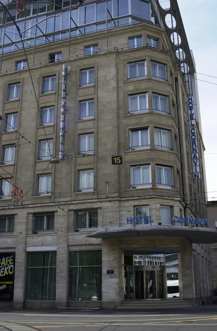 Hotel Cornavin à Genève